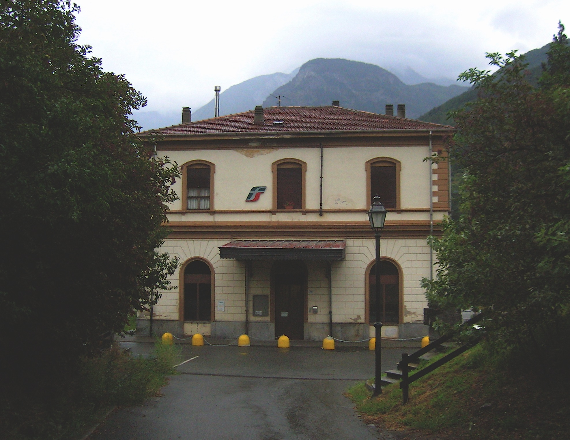 Stazione di Nus, Nus, Valle d'Aosta, Italia.